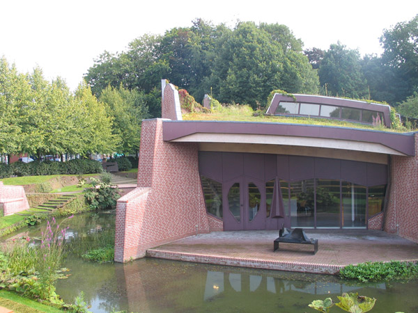 Museum de Buitenplaats in Eelde (The Netherlands)